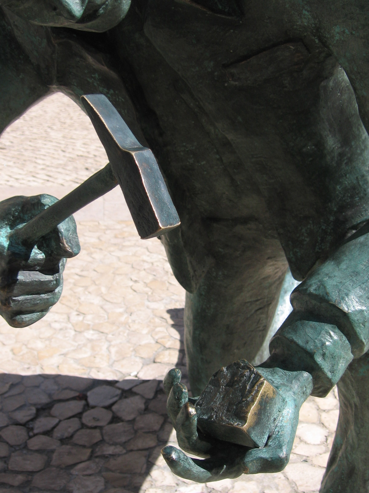 Pormenor da estátua do calceteiro em frente à igreja de São Nicolau, Baixa, Lisboa